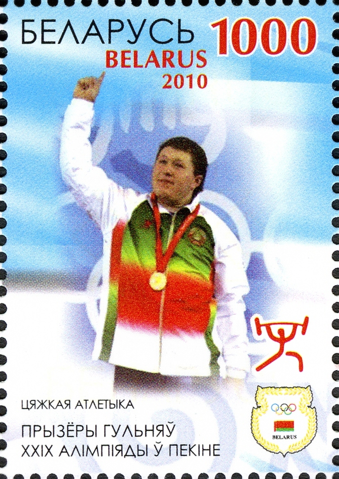 Medal Winners at XXIX Olympic Summer Games in Beijing - Weightlifting